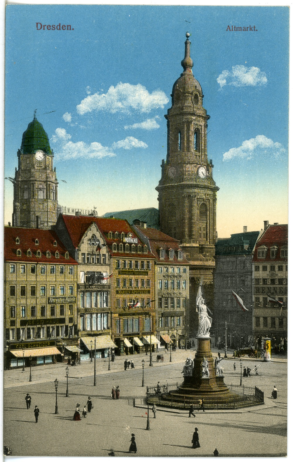 Dresden; Altmarkt This postcard is from publisher Brück & Sohn in Meißen ( postcard has a unique number 19121 and is available in a higher resolution at the publisher. This images was uploaded in a cooperation project between Wikipedians and the publisher.